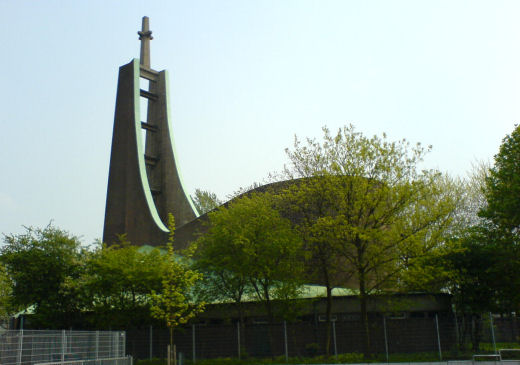 Kirche St. Erich, Hamburg-Rothenburgort.